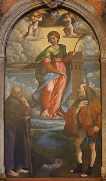 Pala di Francesco Torbido raffigurante Santa Barbara e i Santi Antonio Abate e Rocco per il secondo altare a sinistra della chiesa di Sant'Eufemia a Verona